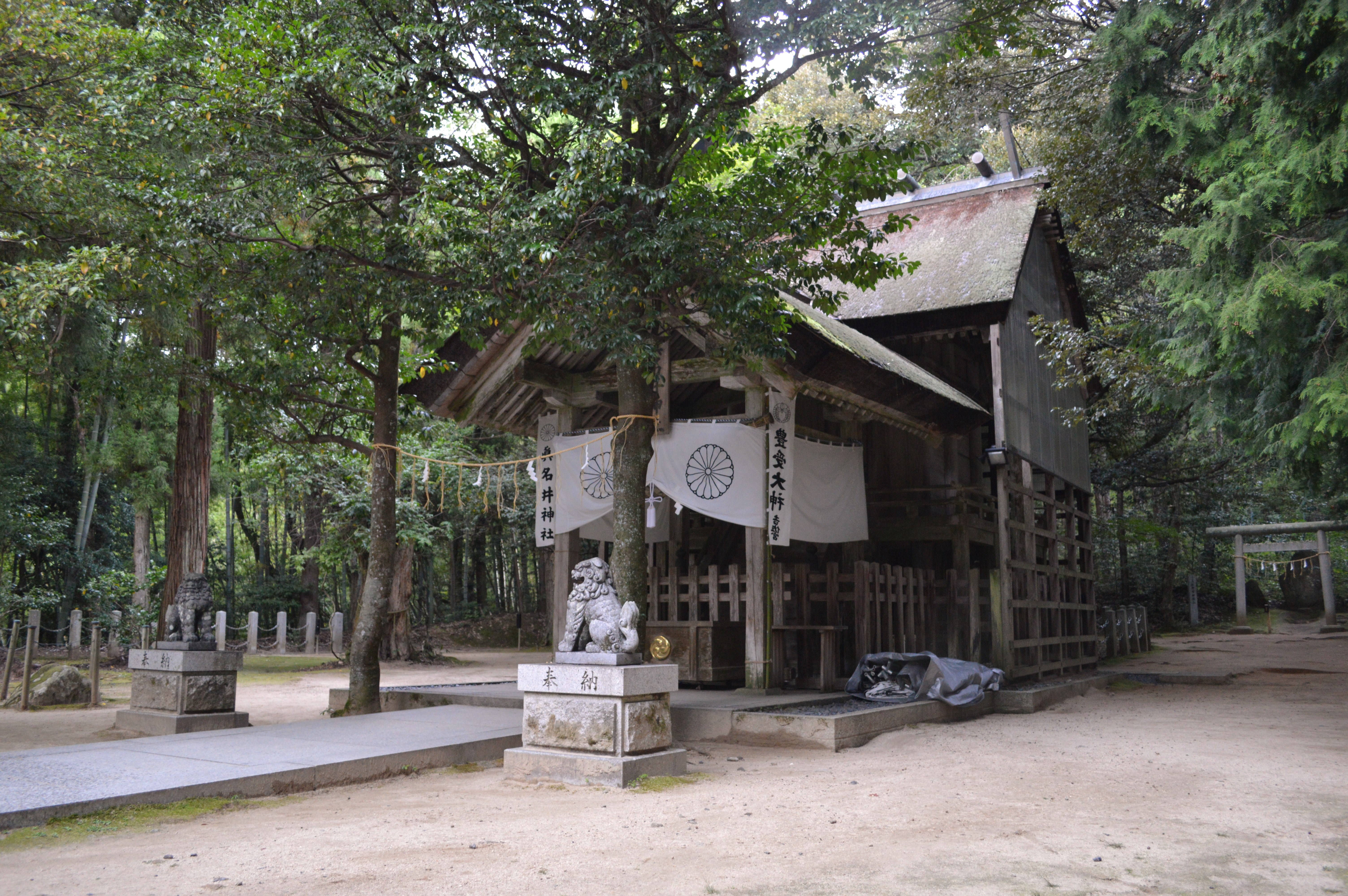 真名井神社 (籠神社奥宮) 社殿